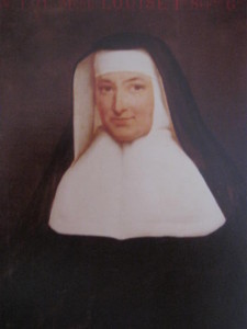 Mère Louise Mabille (1799-1864), première mère supérieure des franciscaines de Calais en 1854.